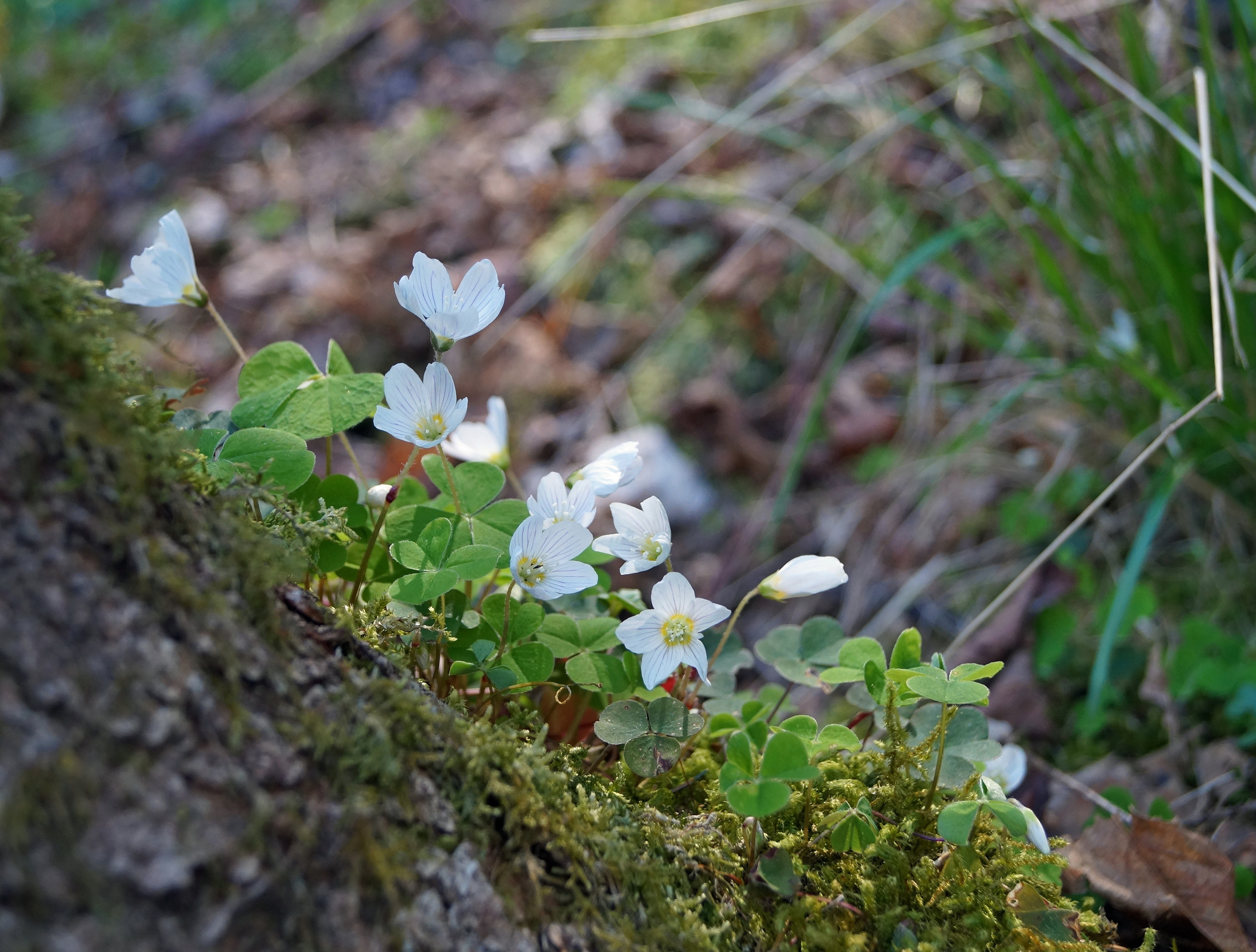 Moose und blühender Waldsauerklee (Oxalis acetosella) auf einem Baumstumpf im Naturschutzgebiet Waldreservat Schanze bei Waidmannsruh (Schmallenberg)